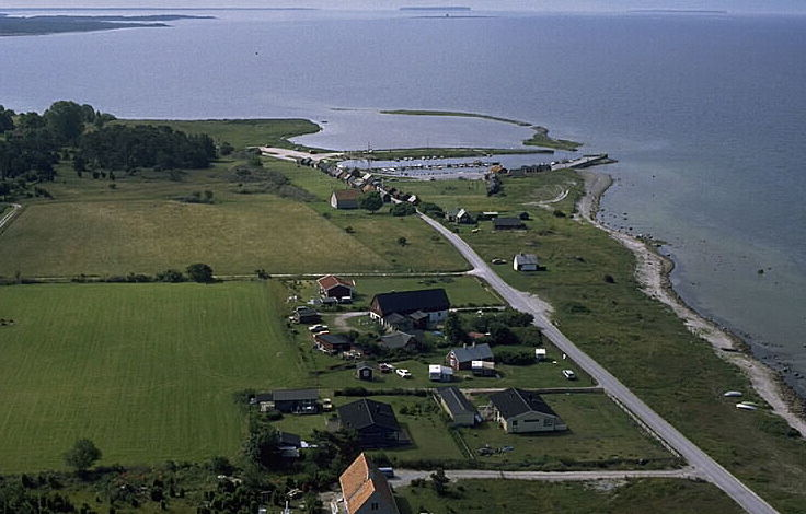 Motiv: Gnisvärd fiskeläge Nyckelord: Flygbilder, Riksintressen Kategori: FiskelägeGnisvärd fiskeläge